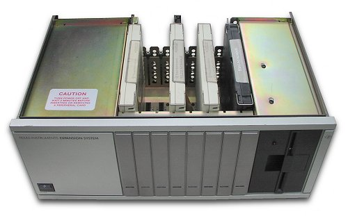 Foto eines Texas Instruments TI Peripheral Expansion System (Oberseite in Vorderansicht)